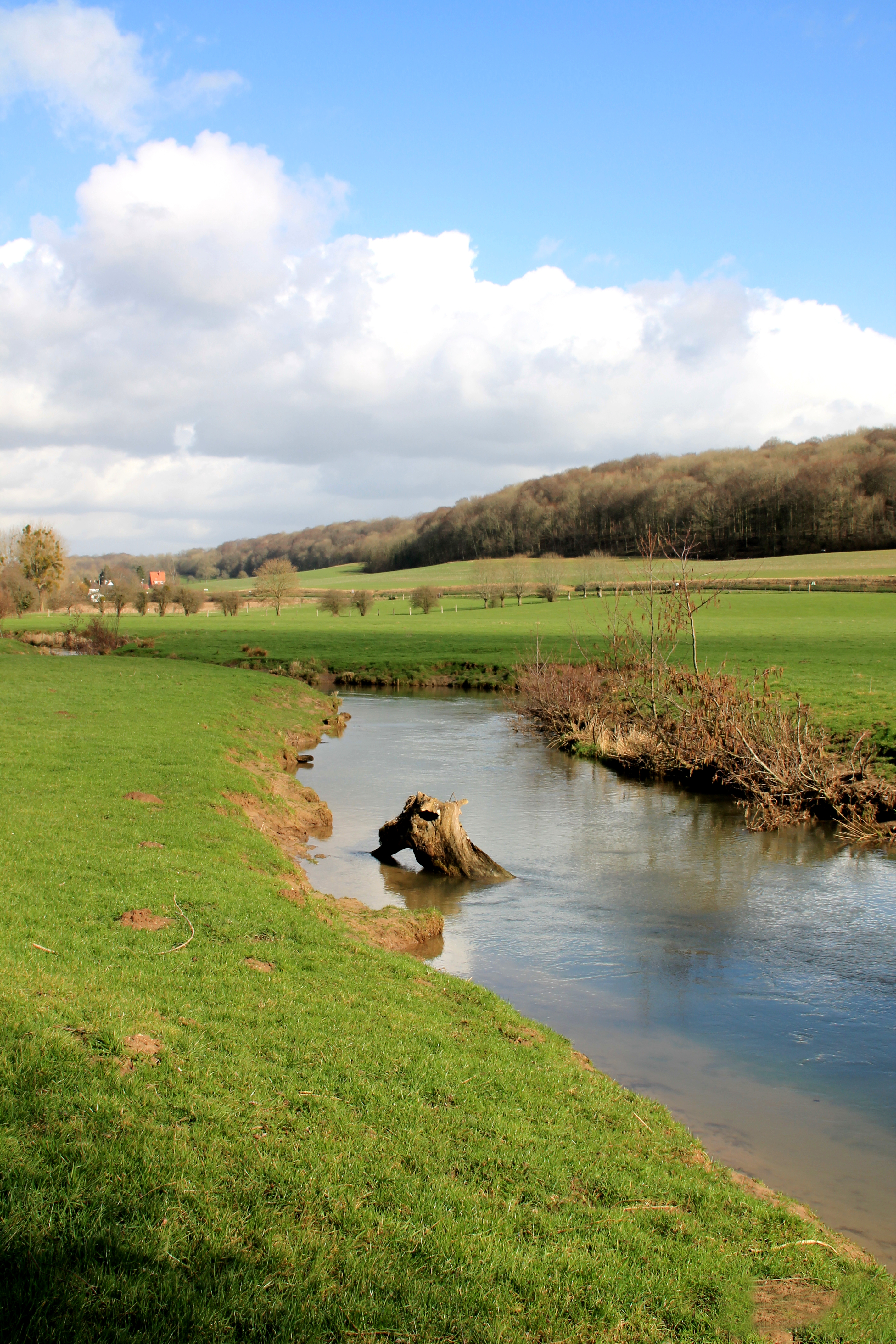 La Créquoise est une rivière du département Pas-de-Calais de 15 km de long, dans la région Nord-Pas-de-Calais et un affluent de la Canche en rive droite. Son nom viendrait du créquier sorte de prunier sauvage abondant sur les rives de la Créquoise1. ou de la creque ou prune comme la commune origine de la Créquoise : Créquy. Dans le seul département du Pas-de-Calais, la Créquoise traverse huit communes et deux cantons : dans le sens amont vers aval : Créquy (source), Torcy, Royon, Lebiez, Hesmond, Offin, Loison-sur-Créquoise, Beaurainville (confluence). Soit en termes de cantons, la Créquoise prend source dans le canton de Fruges, et conflue sur le canton de Campagne-lès-Hesdin.